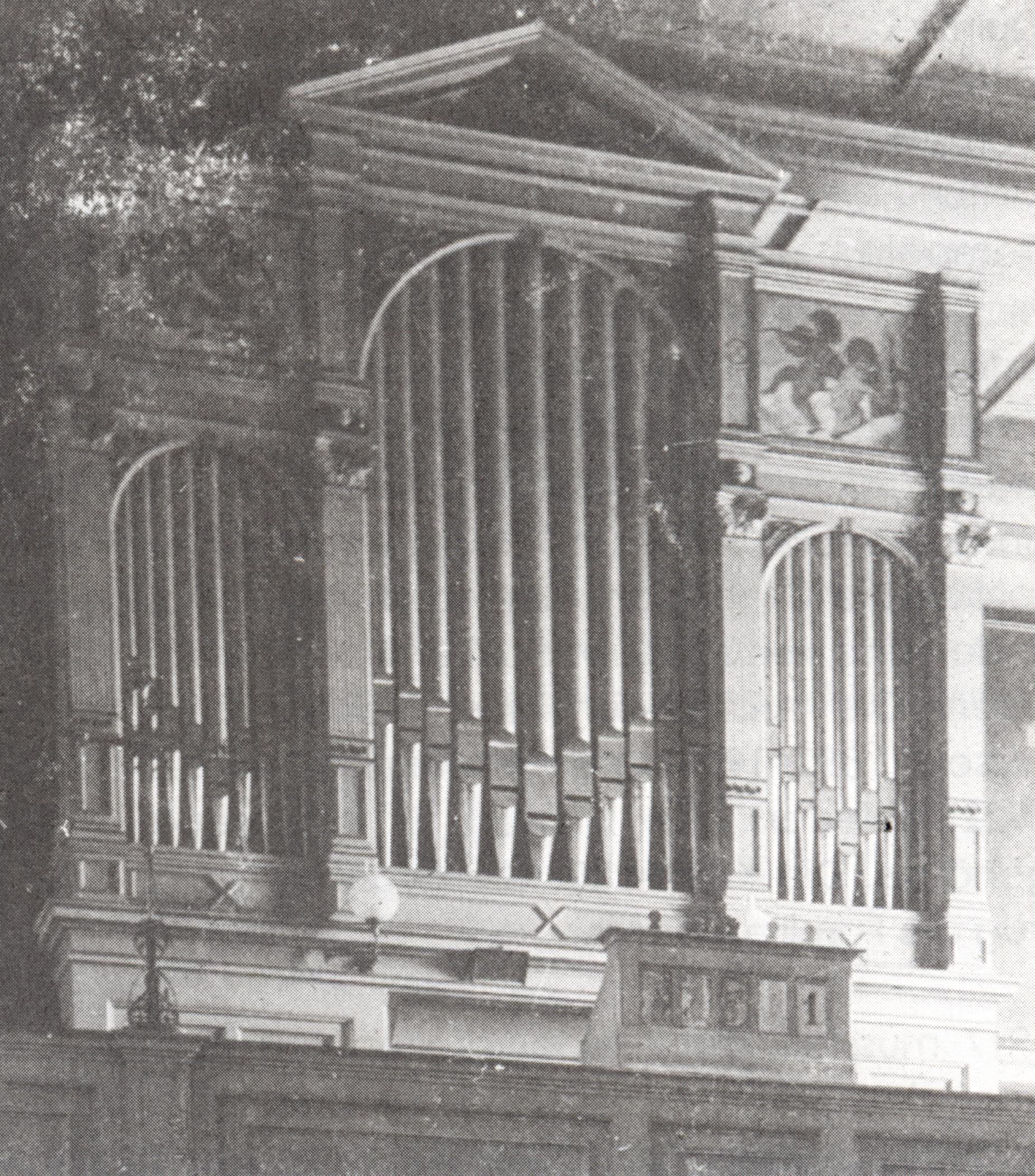 Orgel der Auferstehungskirche Dresden-Plauen 1879-1902